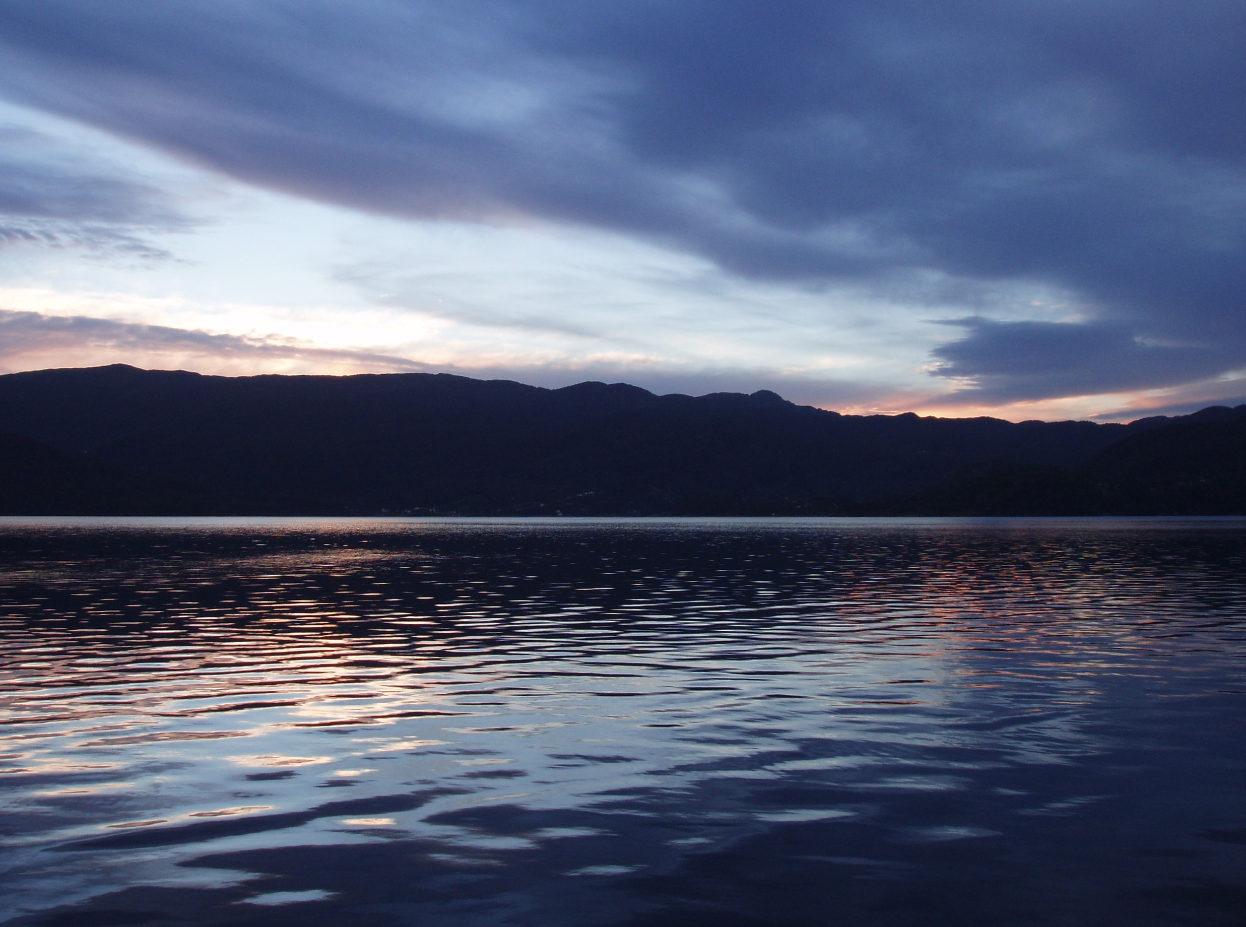 Samnangerfjorden a late summer evening. Seen from Tysse.